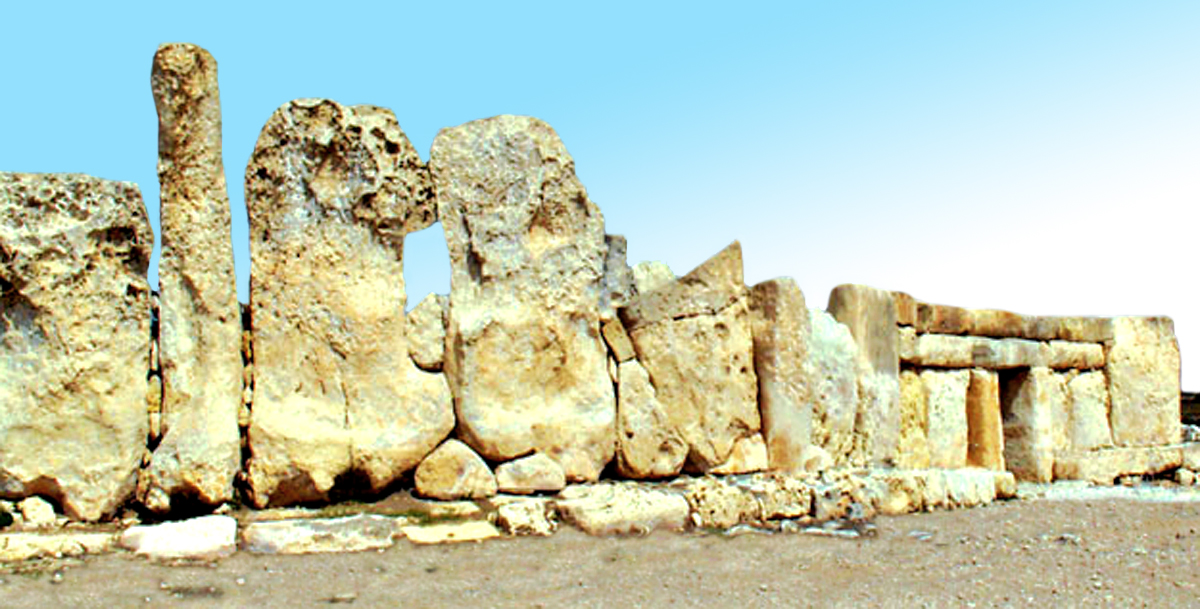 Temple mégalithique Hagar Qim